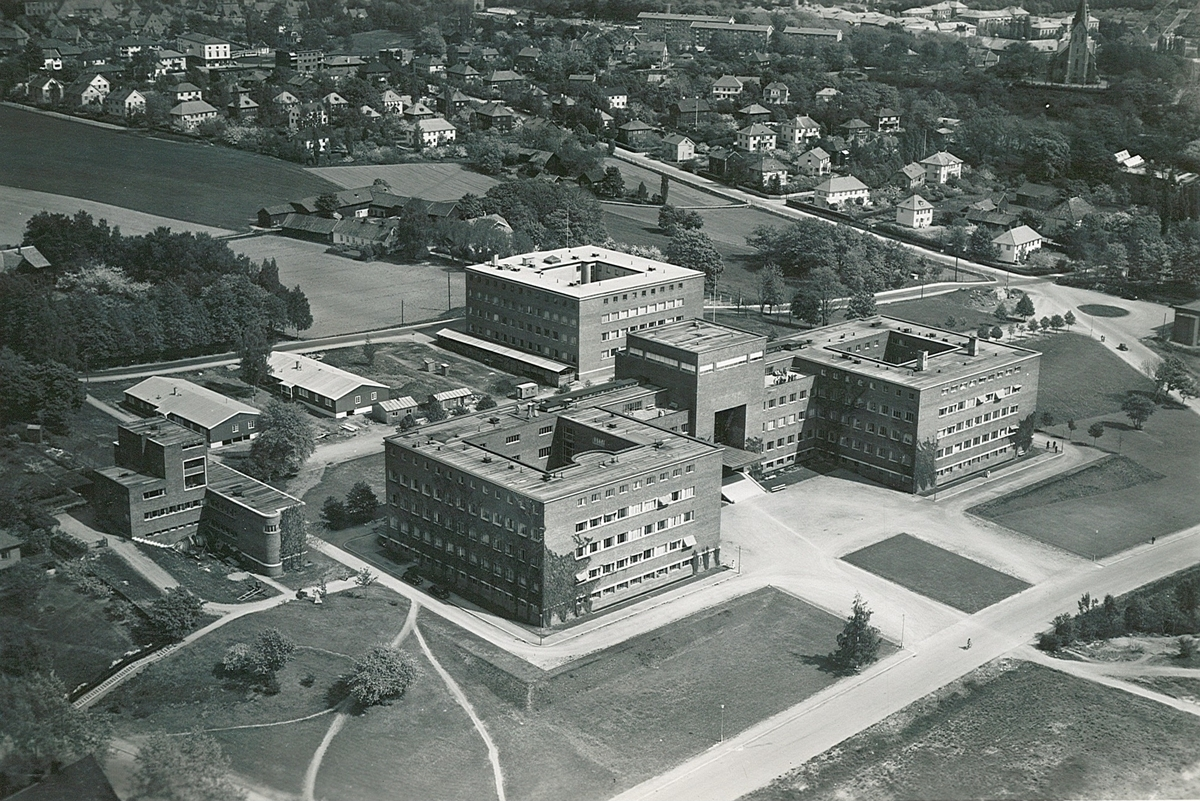 Universitetsområdet på Blindern, ca. 1955